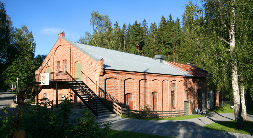 Art hall, Kistefos Museum, Jevnaker, Norway.